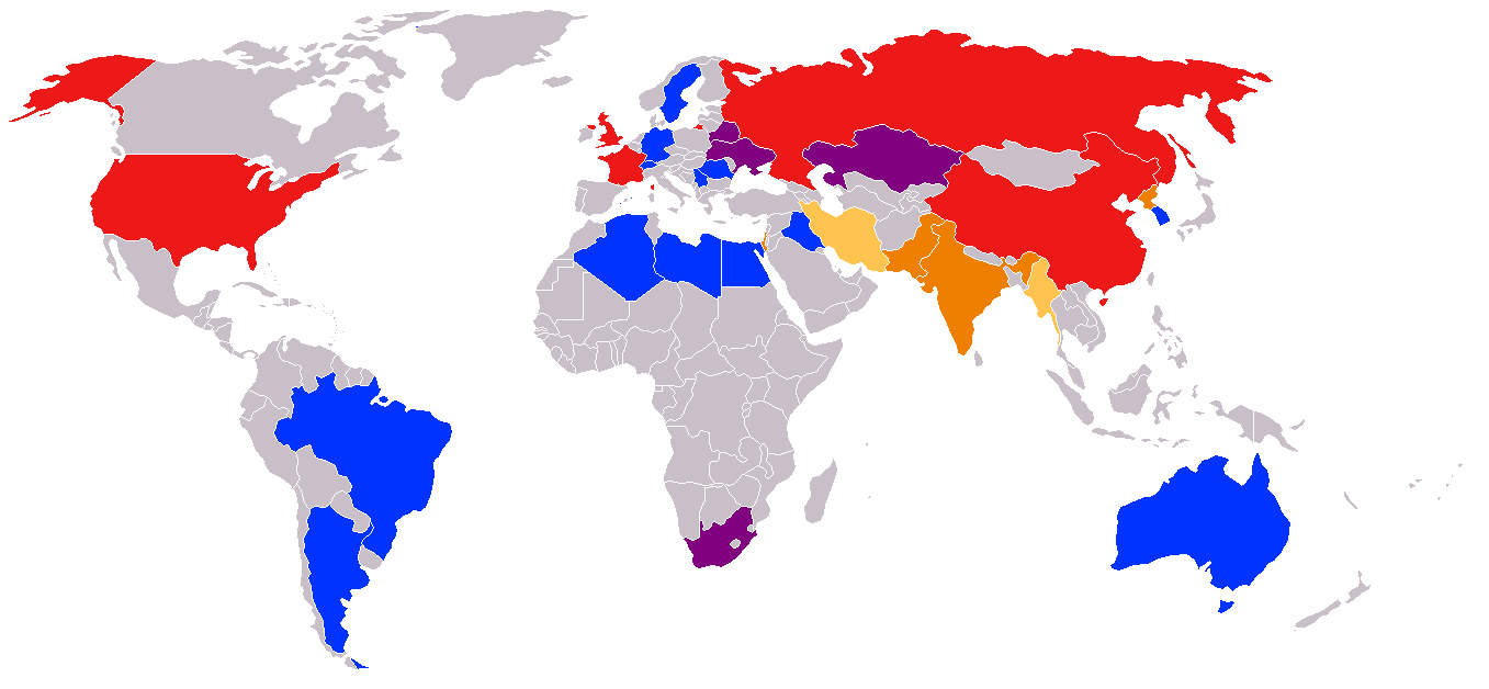 Ядерные державы на карте мира Красный: Официальные ядерные державы (Соединненые Штаты Америки, Российская Федерация, Великобритания, Франция, Китайская Народная Респубика) Оранжевый: Другие известные ядерные державы (Индия, Пакистан) Жёлтый: Державы, подозревающиеся во владении ядерным оружием (Израиль, Иран) Синий: Державы, свернувшие свои ядерные программы (Аргентина, Бразилия, Египет, Германия, Ирак, Япония, Ливия, Польша, Румыния, , Южная Корея, Швеция, Швейцария, Тайвань) Лиловый: Страны, имевшие в прошлом ядерное оружие и добровольно отказавшиеся от ядерного оружия (ЮАР, Беларусь, Казахстан, Украина) Зелёный: Страны со значительным ядерным потенциалом Розовый: Северная Корея до конца июня 2008 года представит международному сообществу досье по своей ядерной программе.